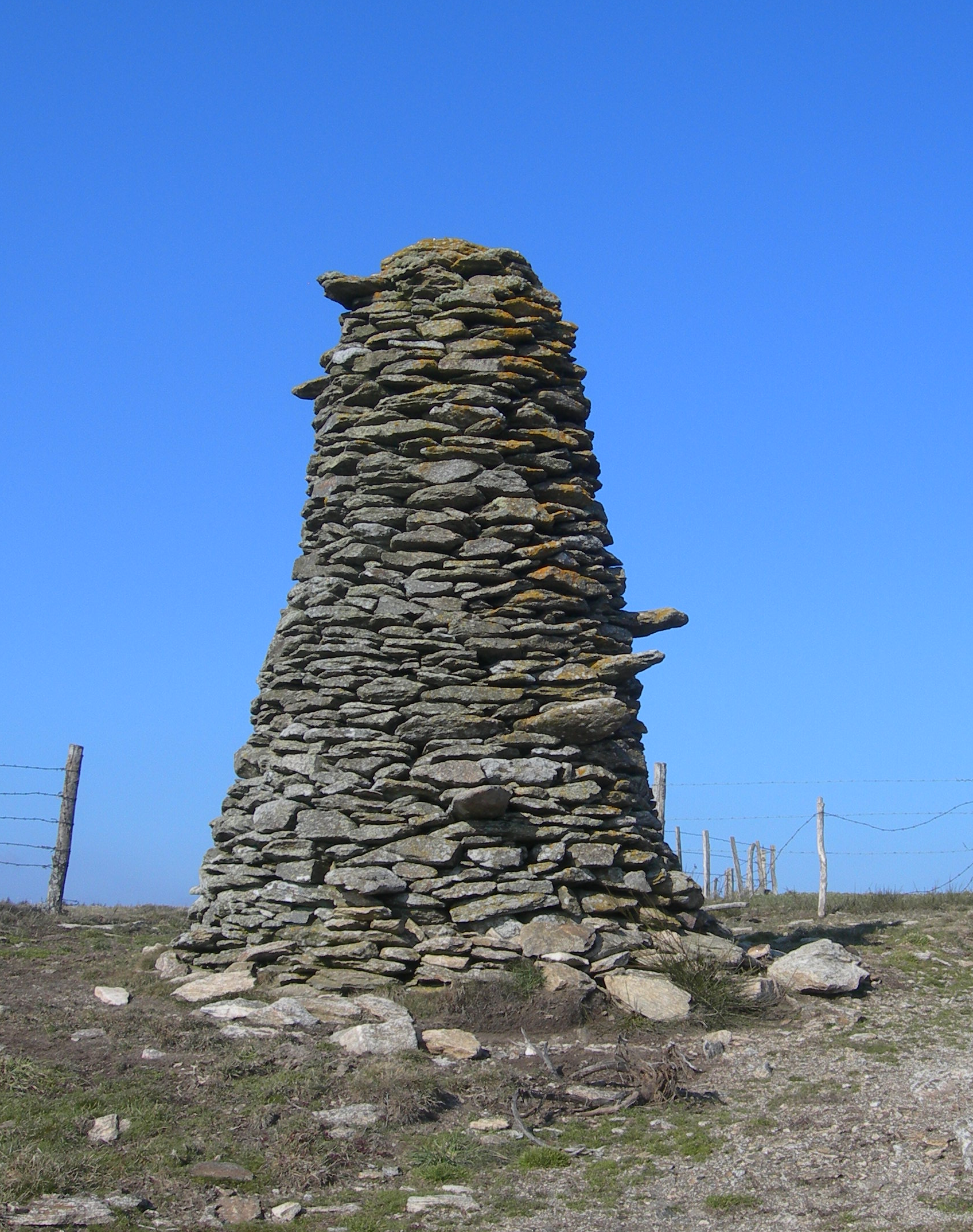 Tour ou quille de berger ronde à côté du relais entre Bouloc et Candadès sur le Lévézou (Aveyron)